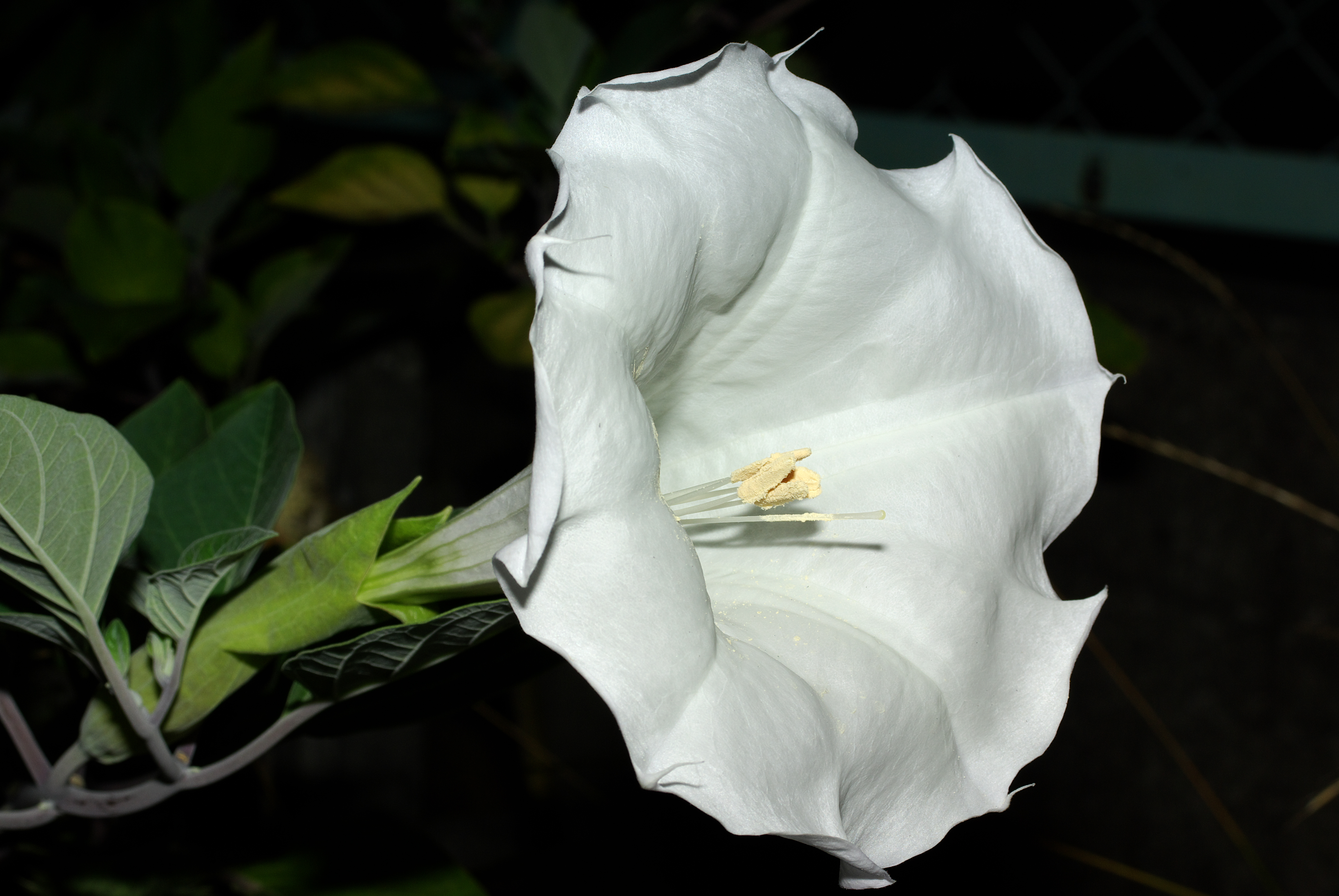 夜間に撮影したケチョウセンアサガオ。ホワイトバランスストロボ。愛知県大府市。